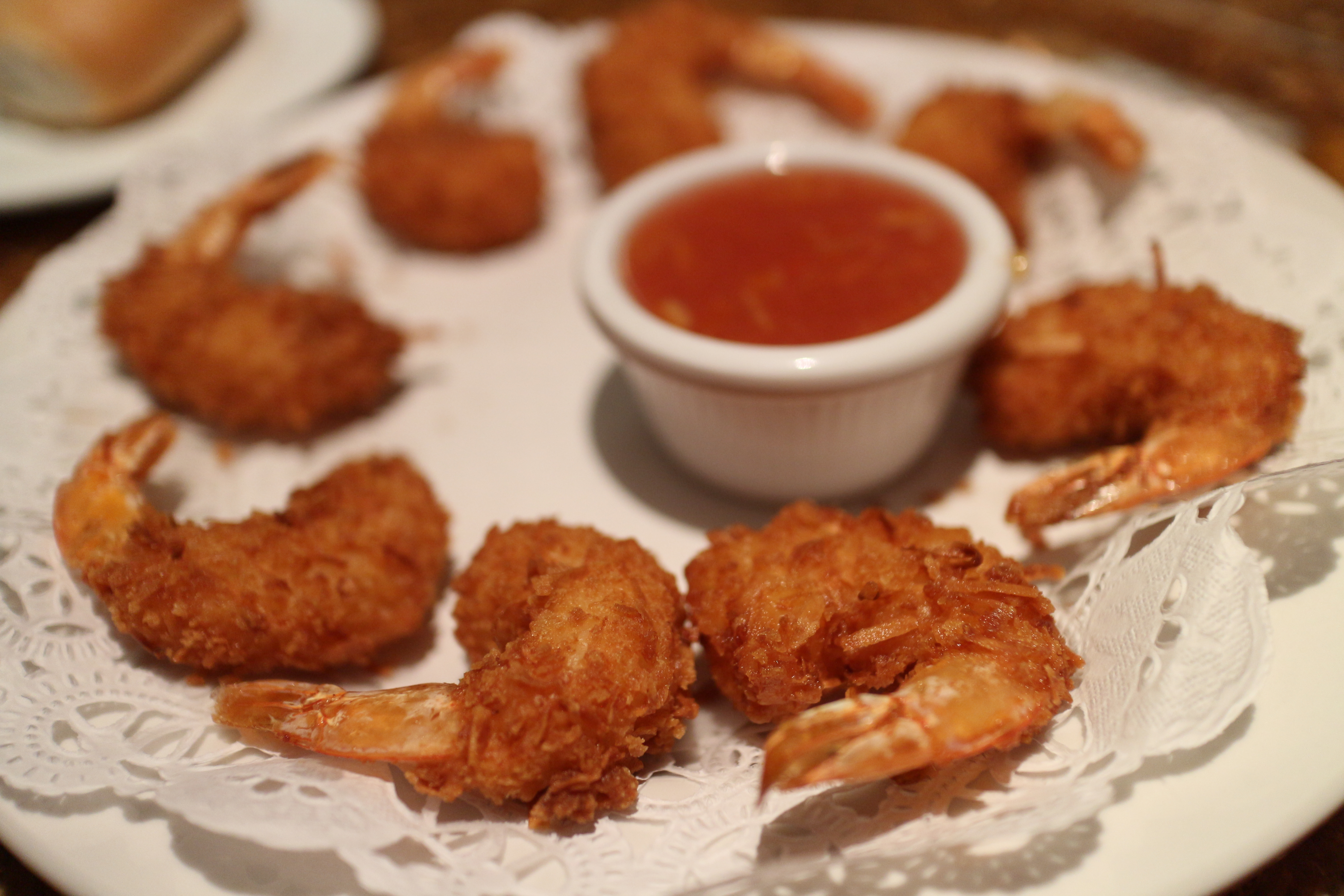 December 7, 2013